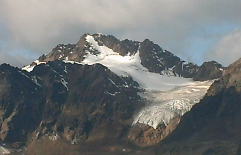 Bliggspitze vom Pitztal